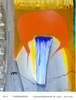 Cuadro de Martín Simón en Alemania